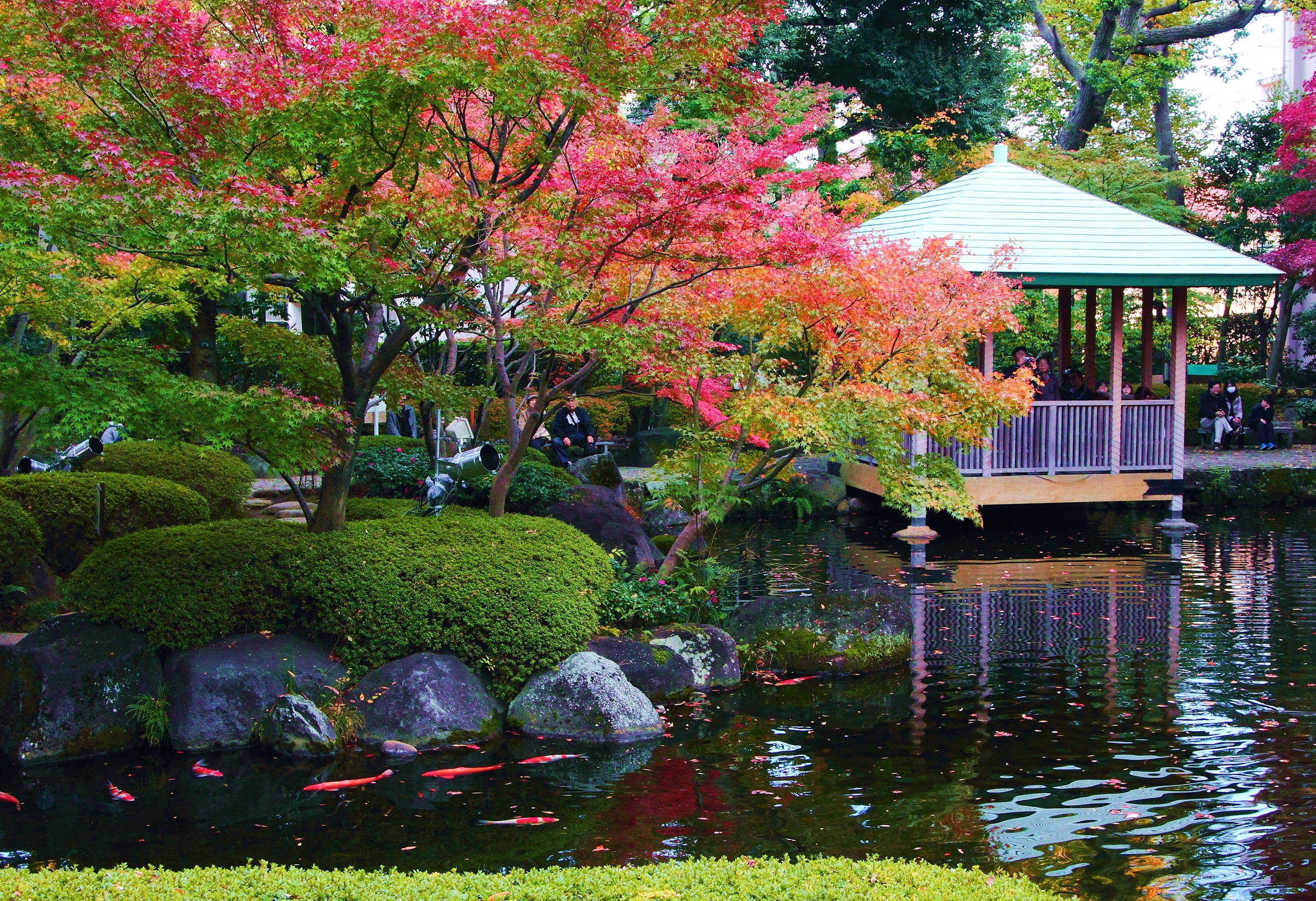 大田黒公園（東京都杉並区）